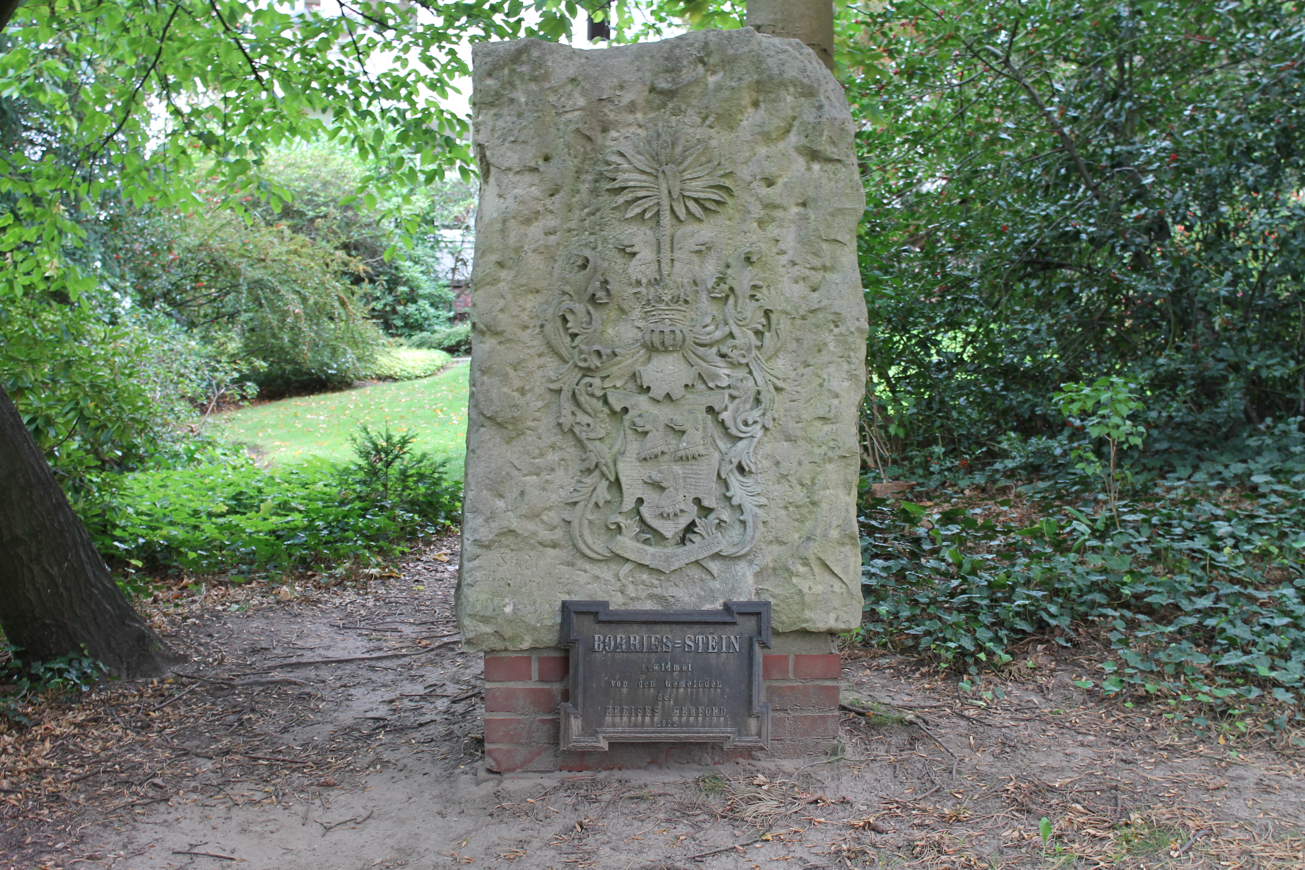 Borriesstein in Herford, Borriesstraße